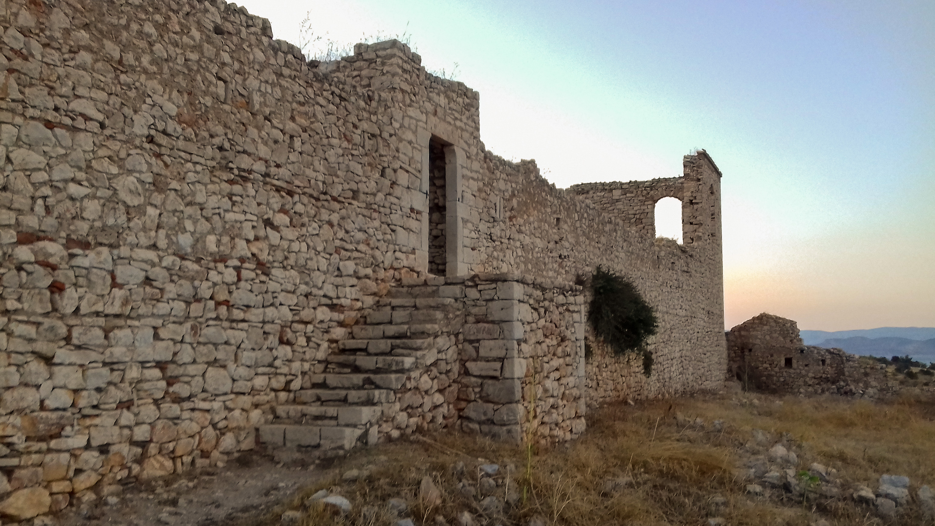 Η είσοδος του Κάστρου (νότια πλευρά)